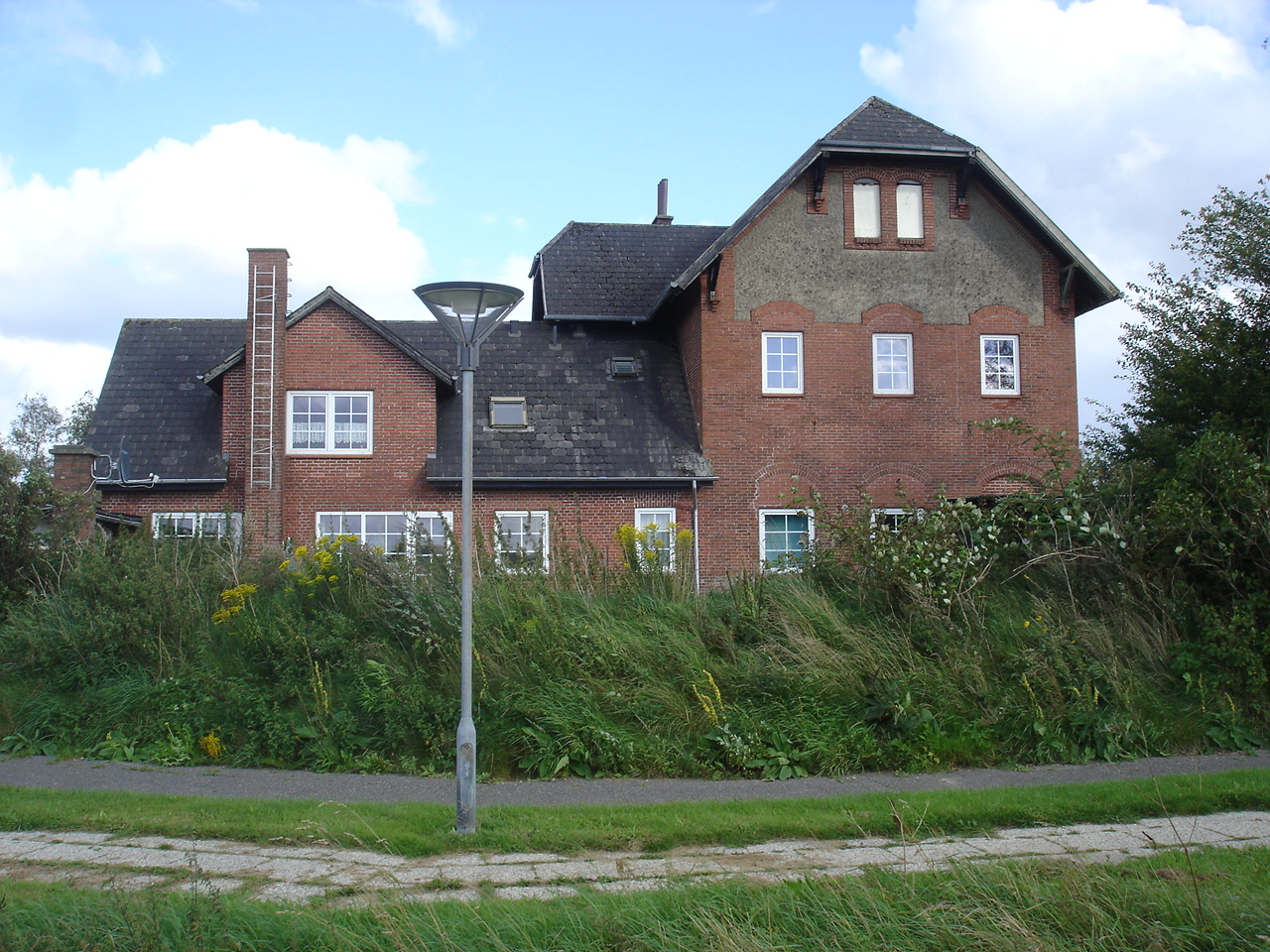 Smedeby Station fra V